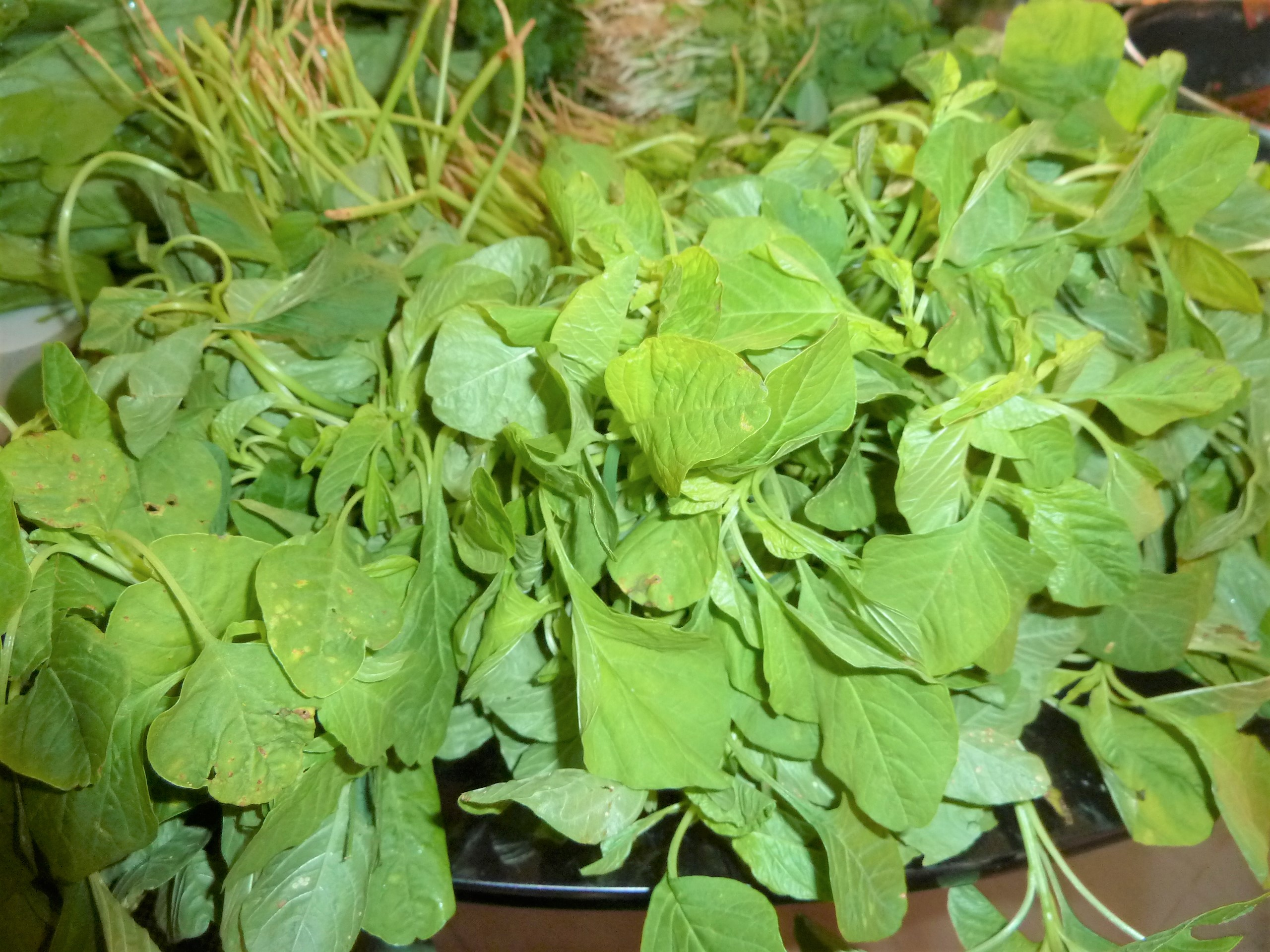 తోటకూర